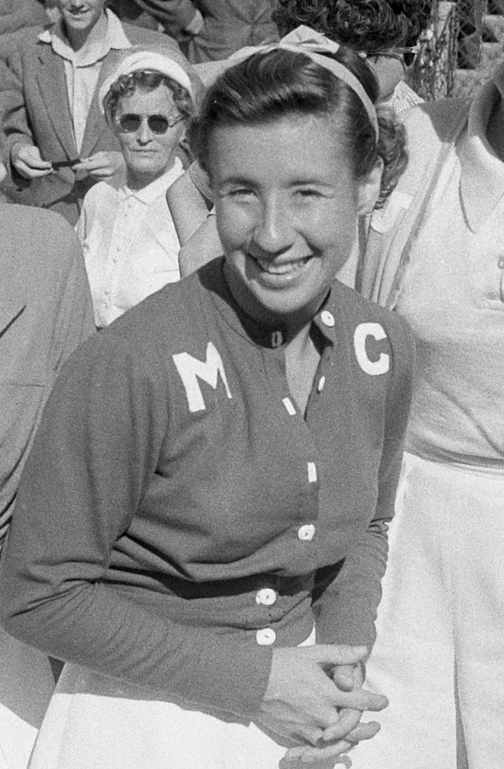 Tennis Noordwijk. Maureen Connolly